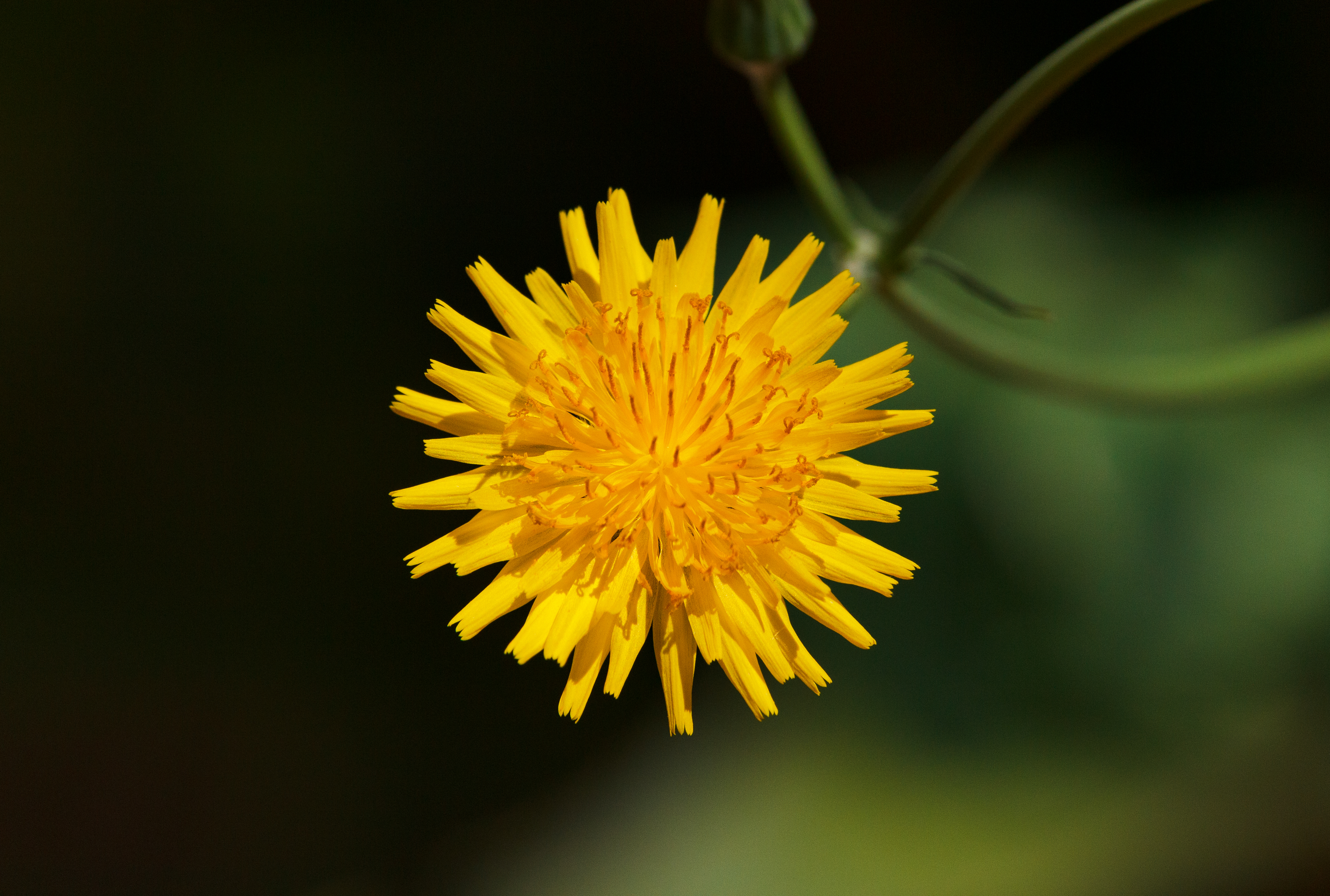 Flor de diente de leon